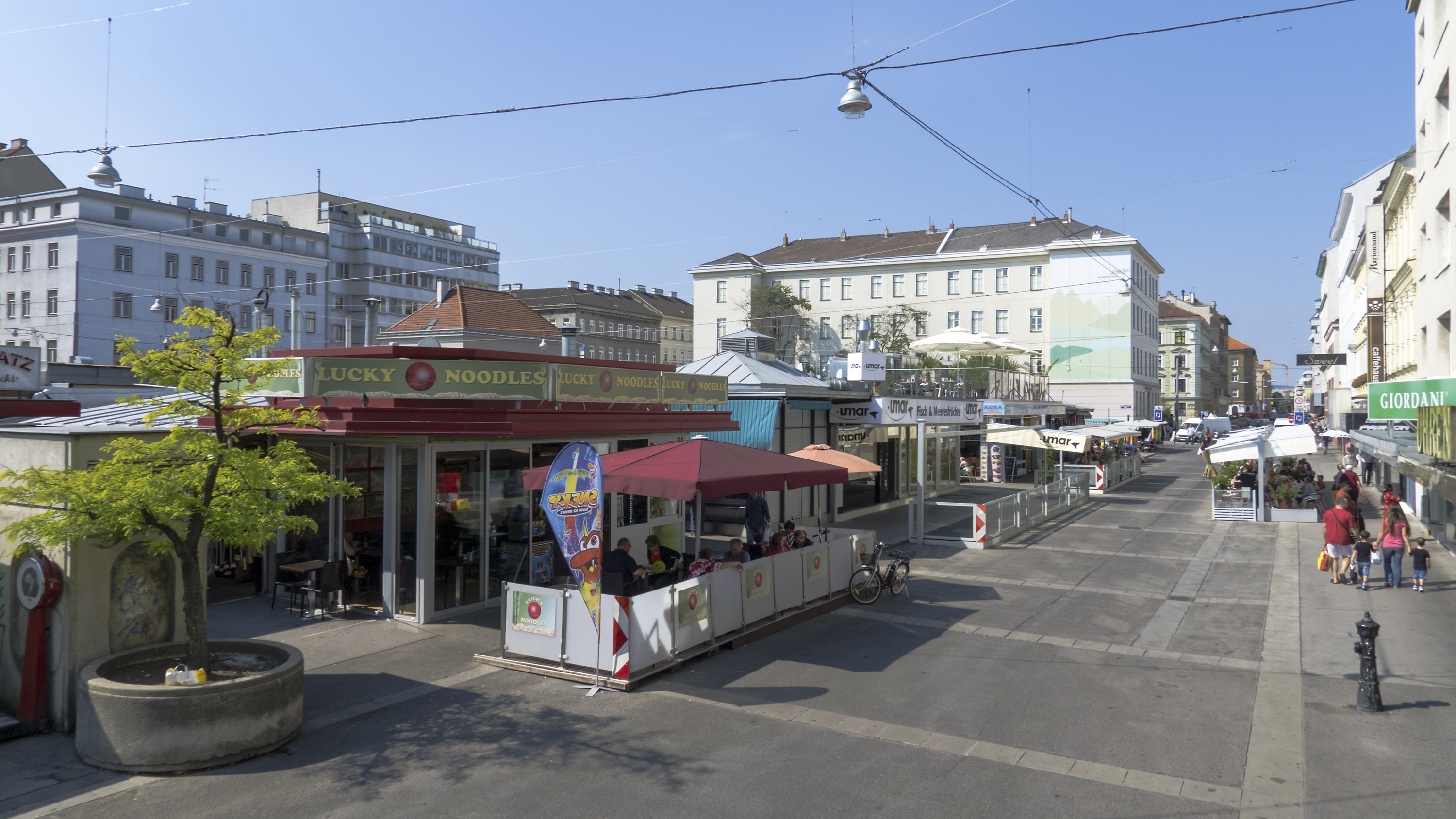 Viktor-Adler-Platz in Wien 10 bei der Favoritenstraße 120 Richtung Südwesten